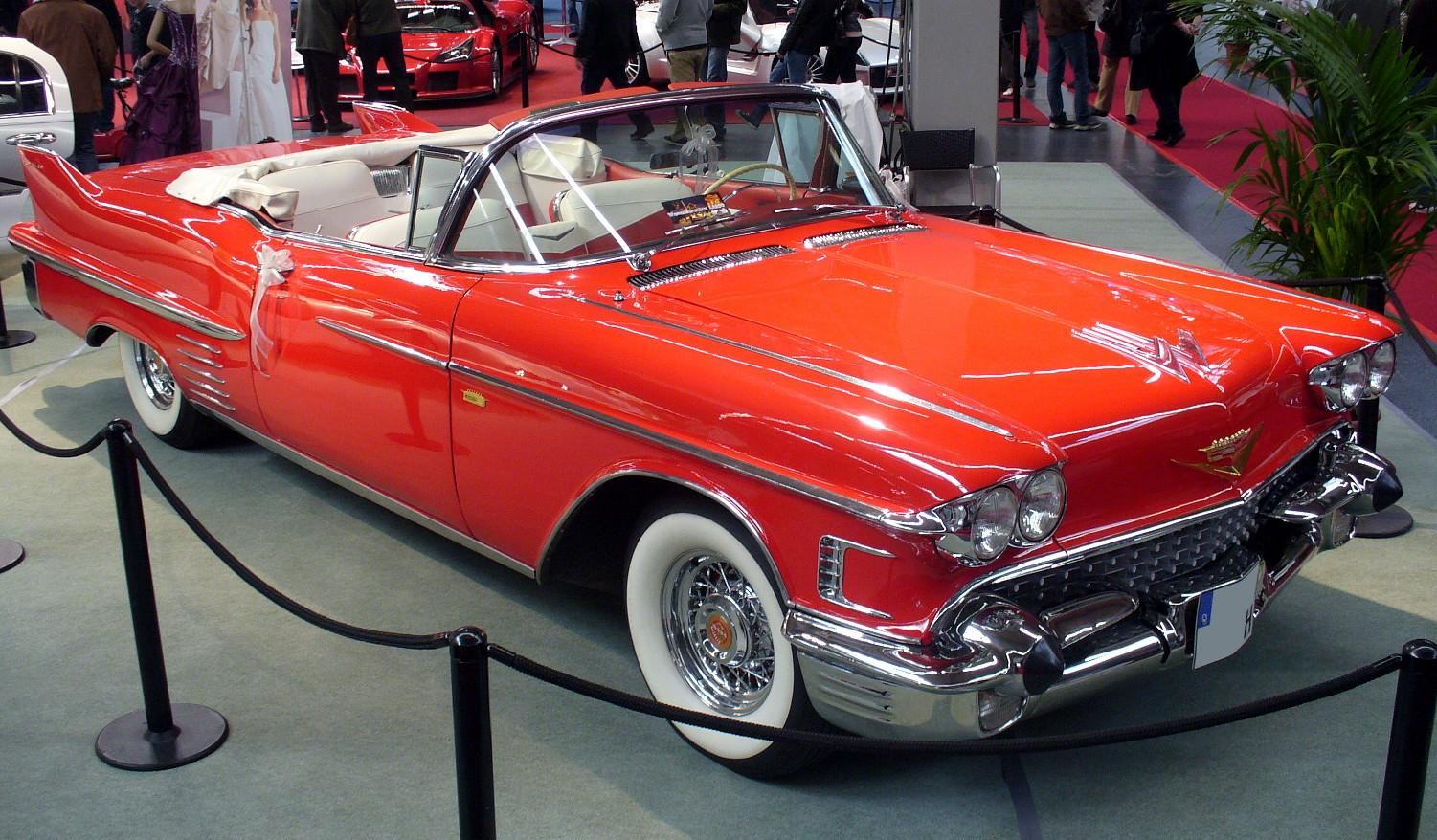 Cadillac Series 62 convertible 1958